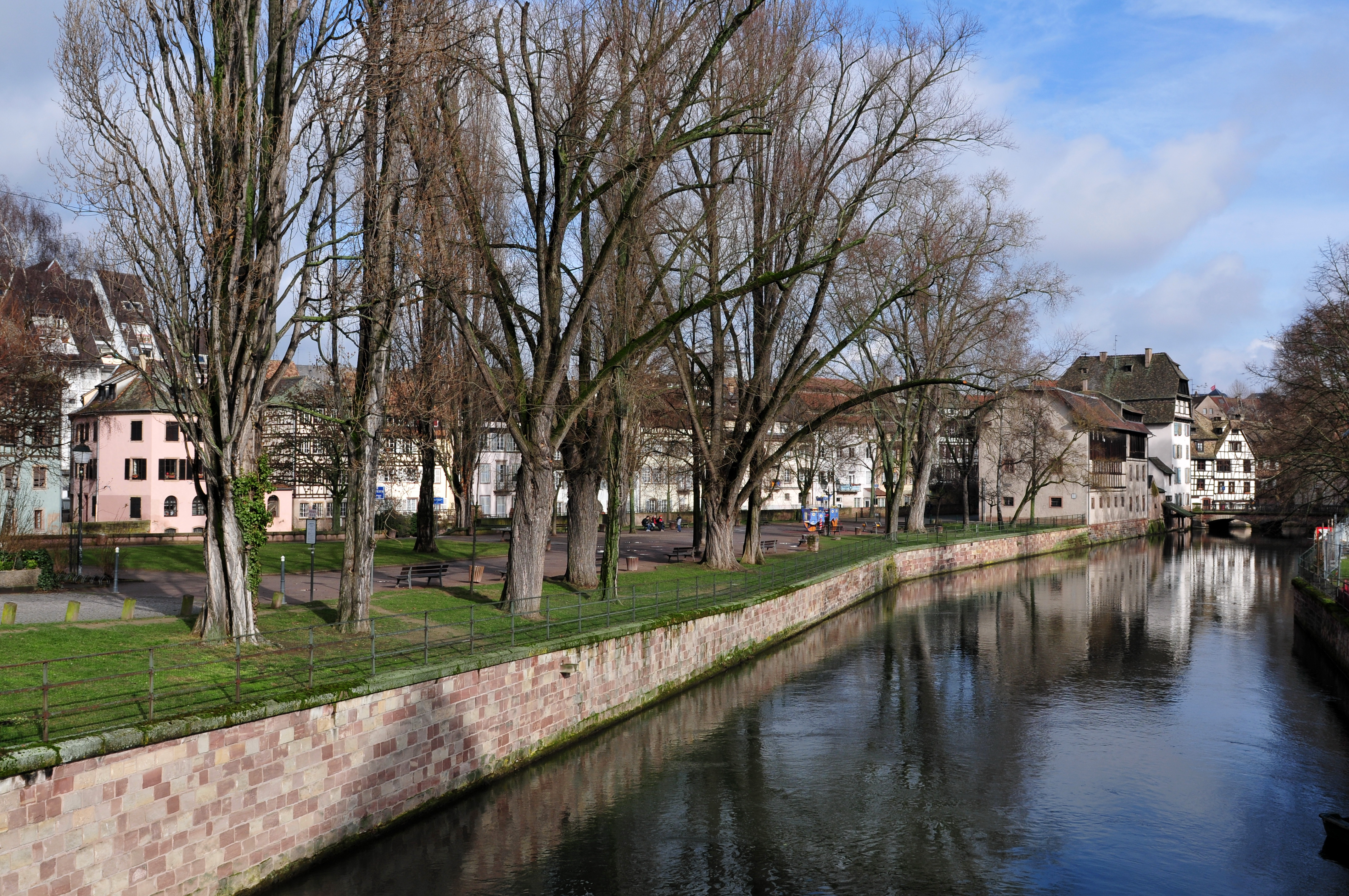 Square Louise Weiss, Straßburg European Parliament 2014 3.–7. February 2014, StrasbourgThis photo has been created within the project "WIKI loves parliaments / European Parliament". Usage and Help If you have any questions concerning this picture or how to use it, feel free to